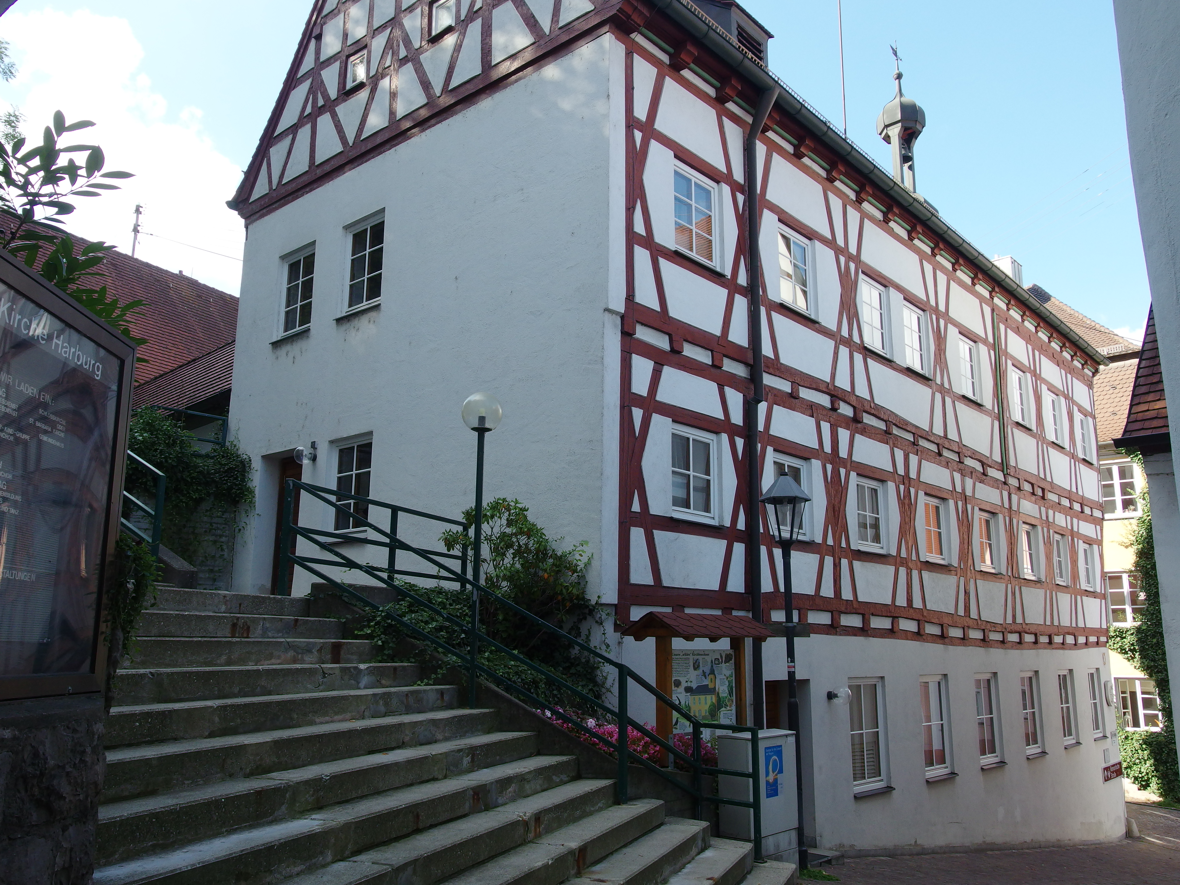 Harburg -Stadt-Schlossstr-1, Rathaus Osttrakt Fachwerkfassade gegen Nordwesten; Treppenaufgang zur evang. Kirche St.BarbaraThis is a photograph of an architectural monument.